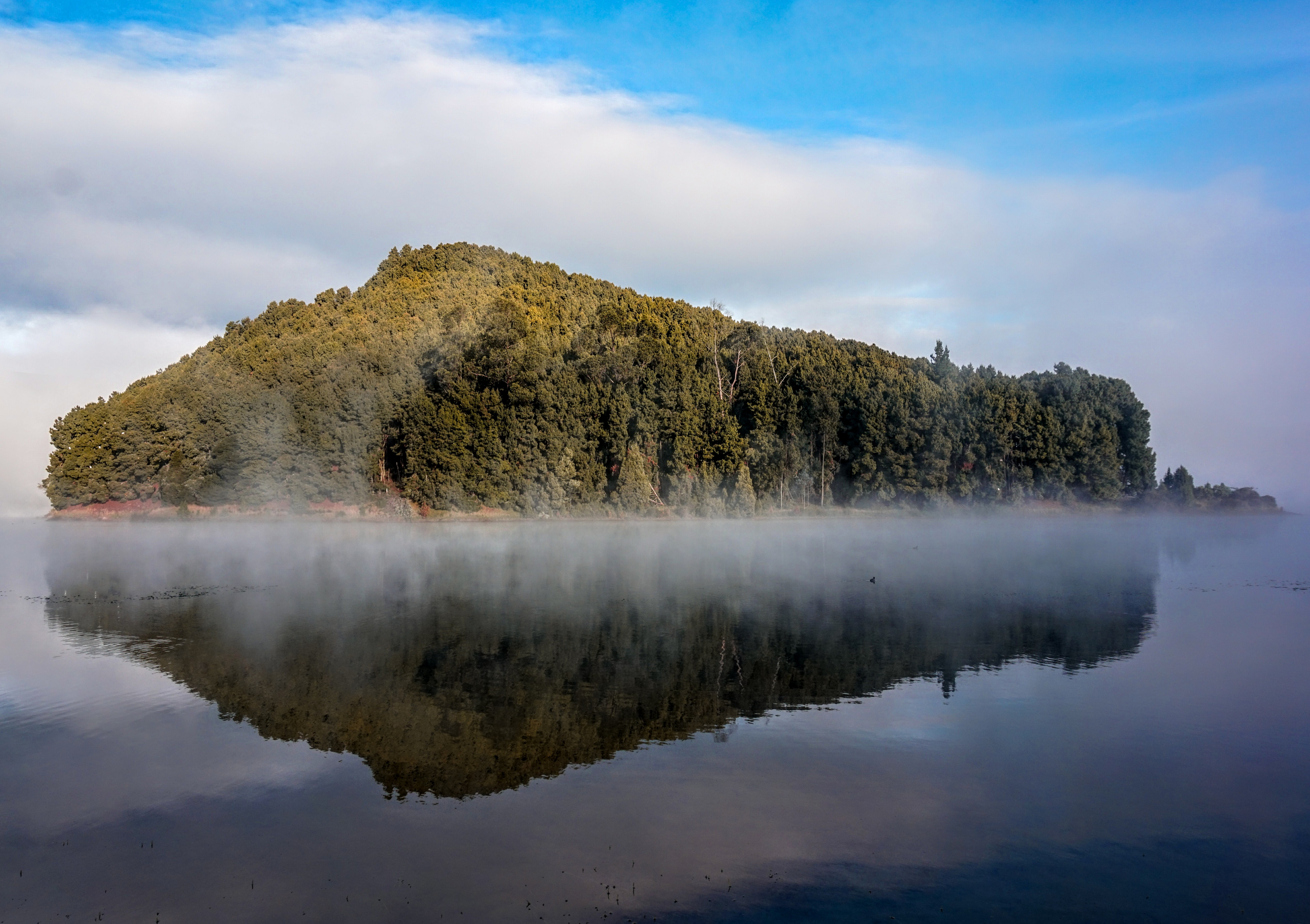 Esta fotografía fue tomada en un área protegida de Colombia con el código 0001 del RUNAP.